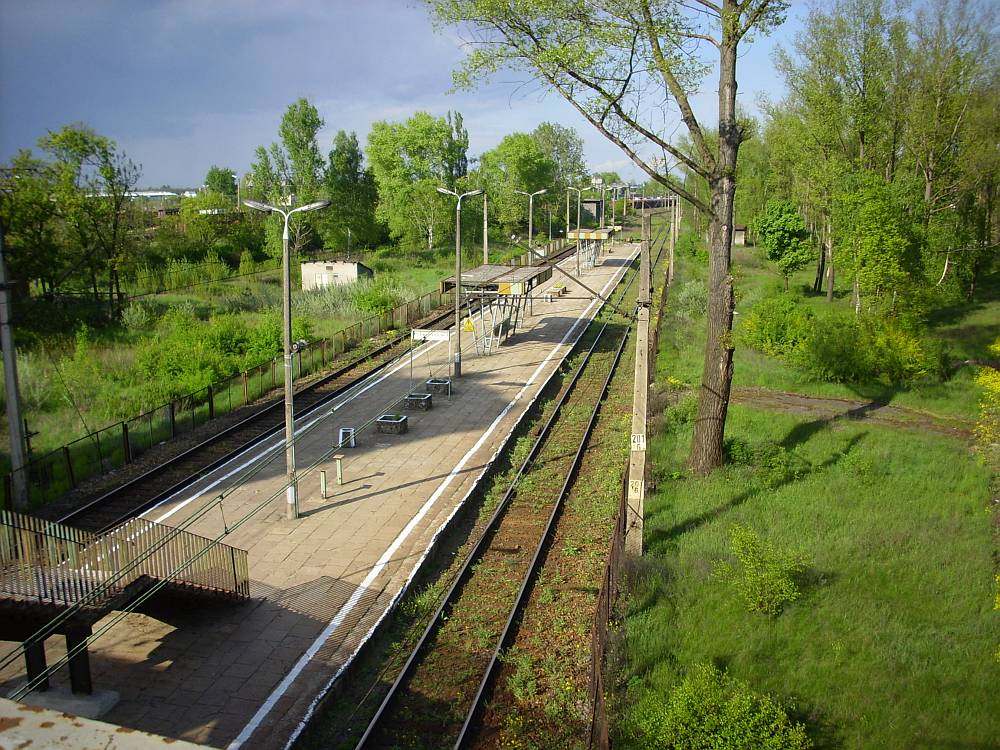 Przystanek osobowy w Małaszewiczach.